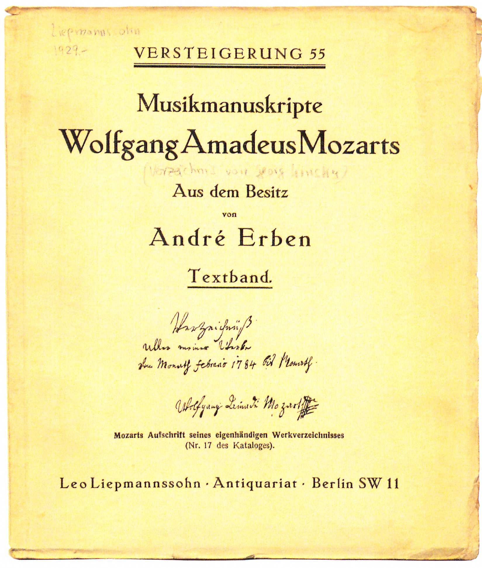 Leo Liepmannssohn Versteigerung Musikmanuskripte Wolfgang Amadeus Mozart André Erben 1929. Beschreibendes Verzeichnis von Georg Ludwig Kinsky.